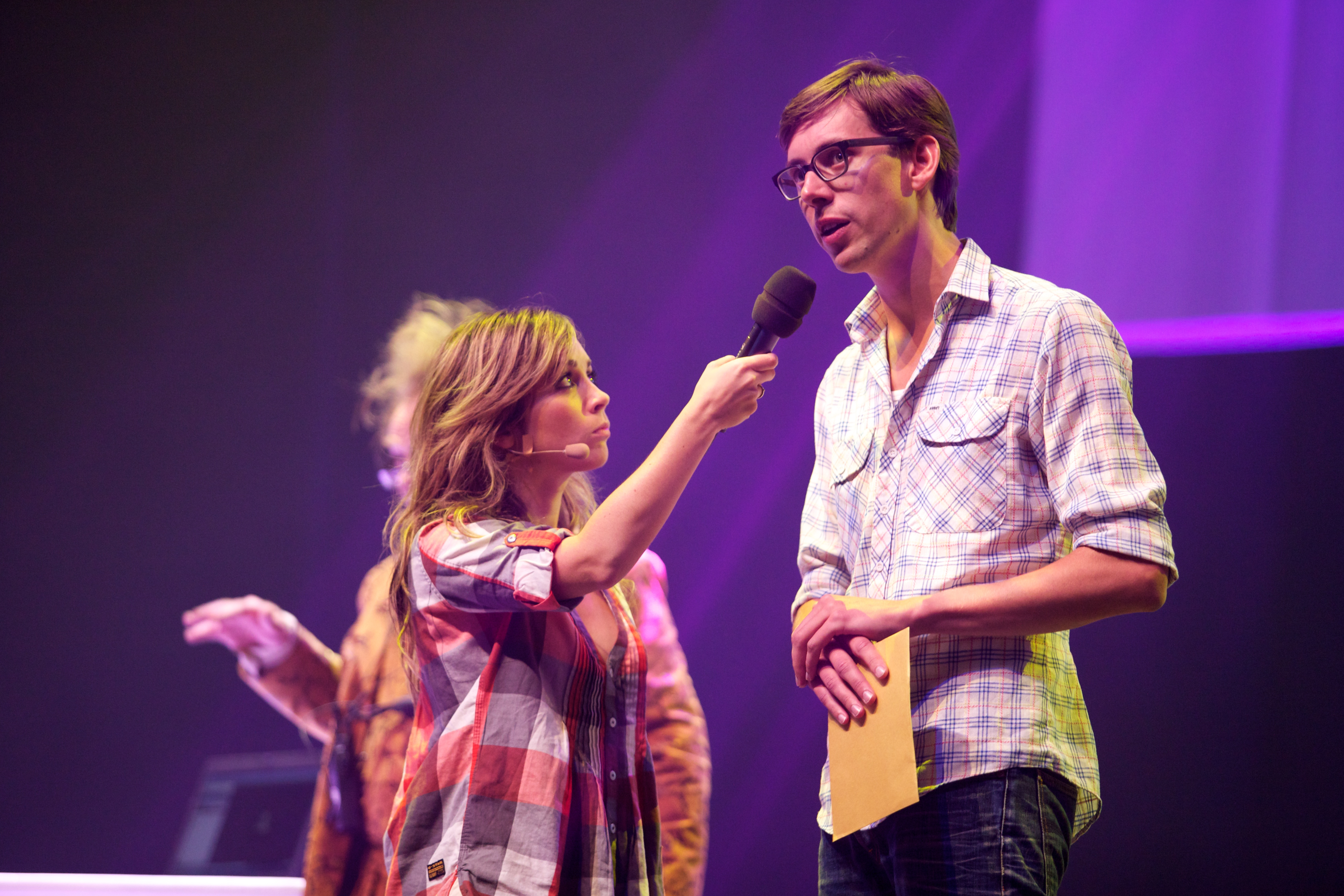 Zie ook